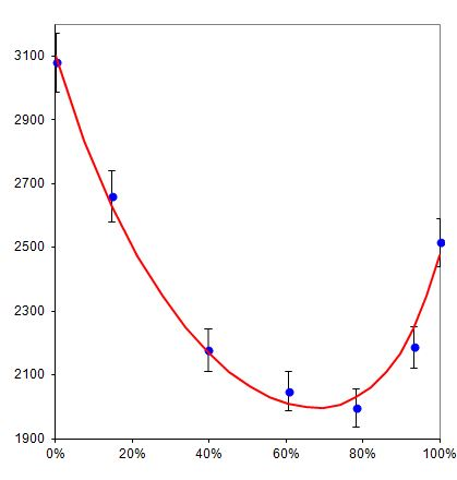 Эффект Фарриса – теория и эксперимент